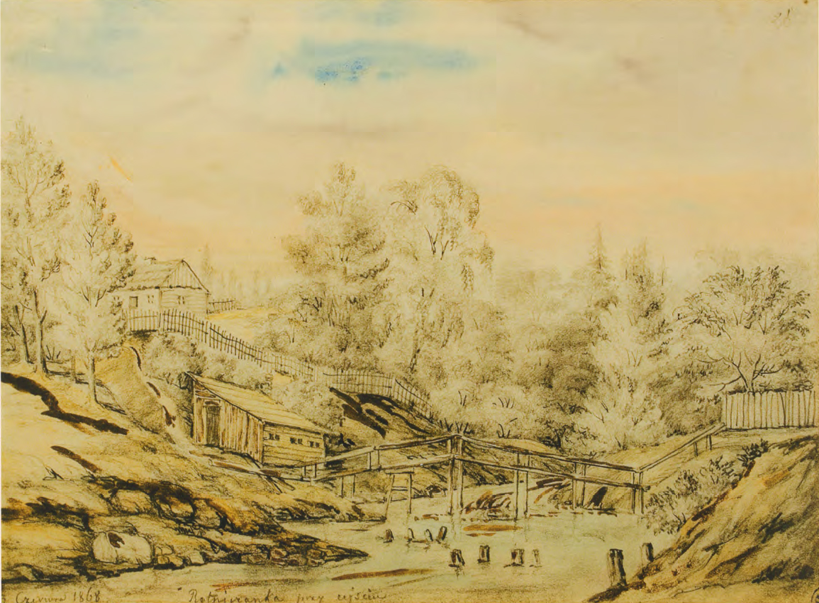 Беларуская (тарашкевіца): Ротніца (Rotnica), рака Ратнічанка (Ratničanka)